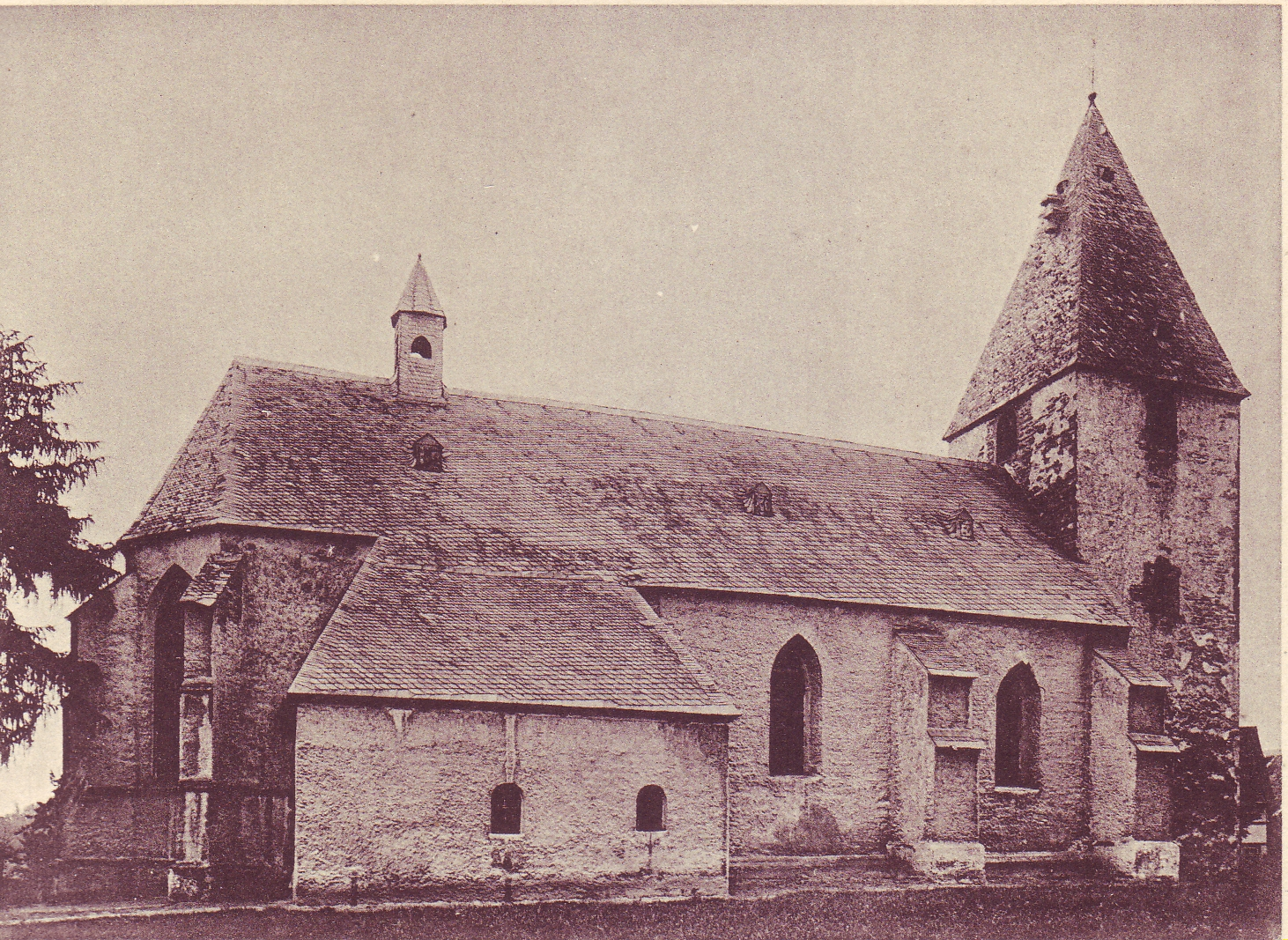 St. Ida (Herzfeld)